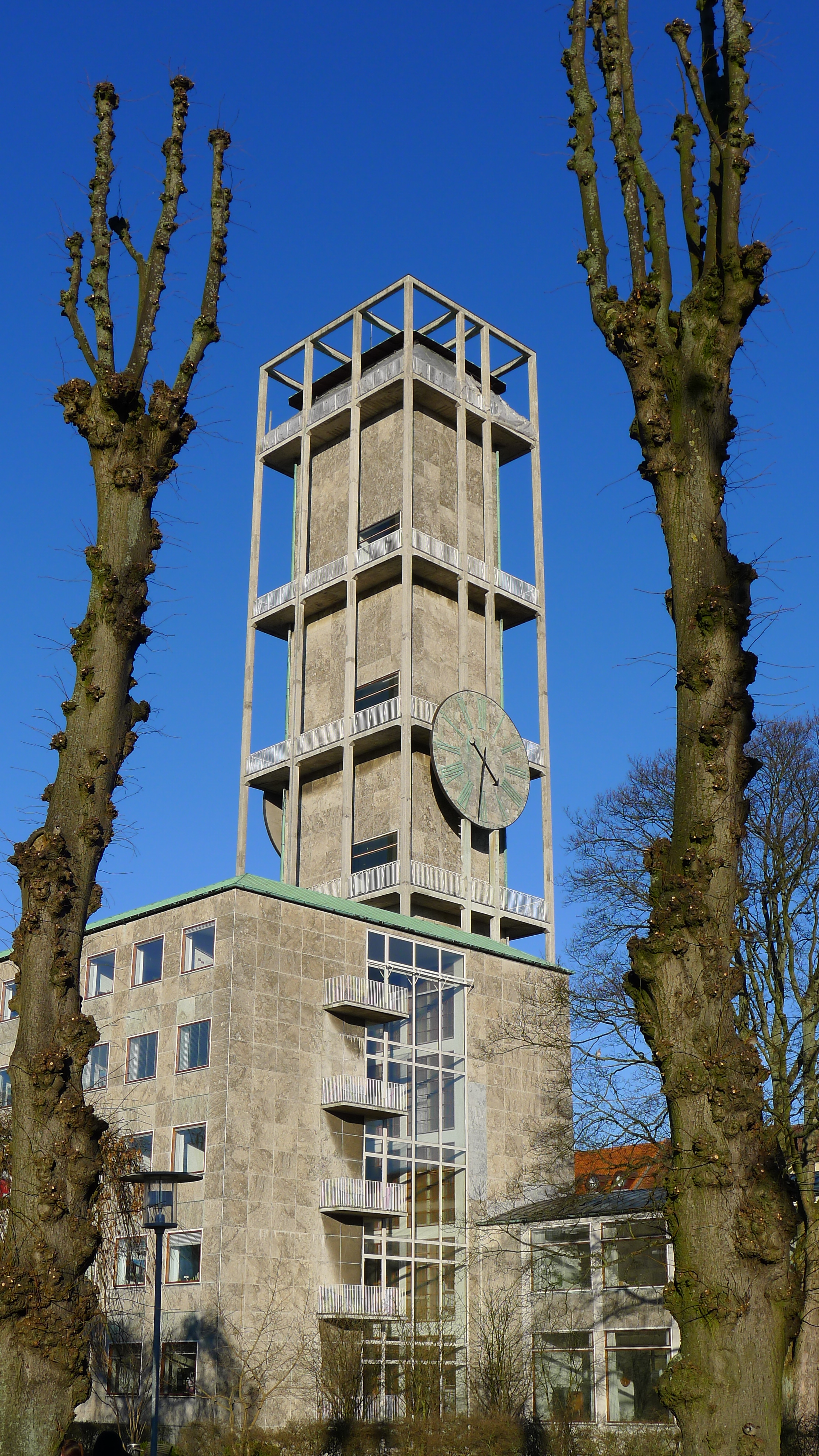 Århus Rådhus